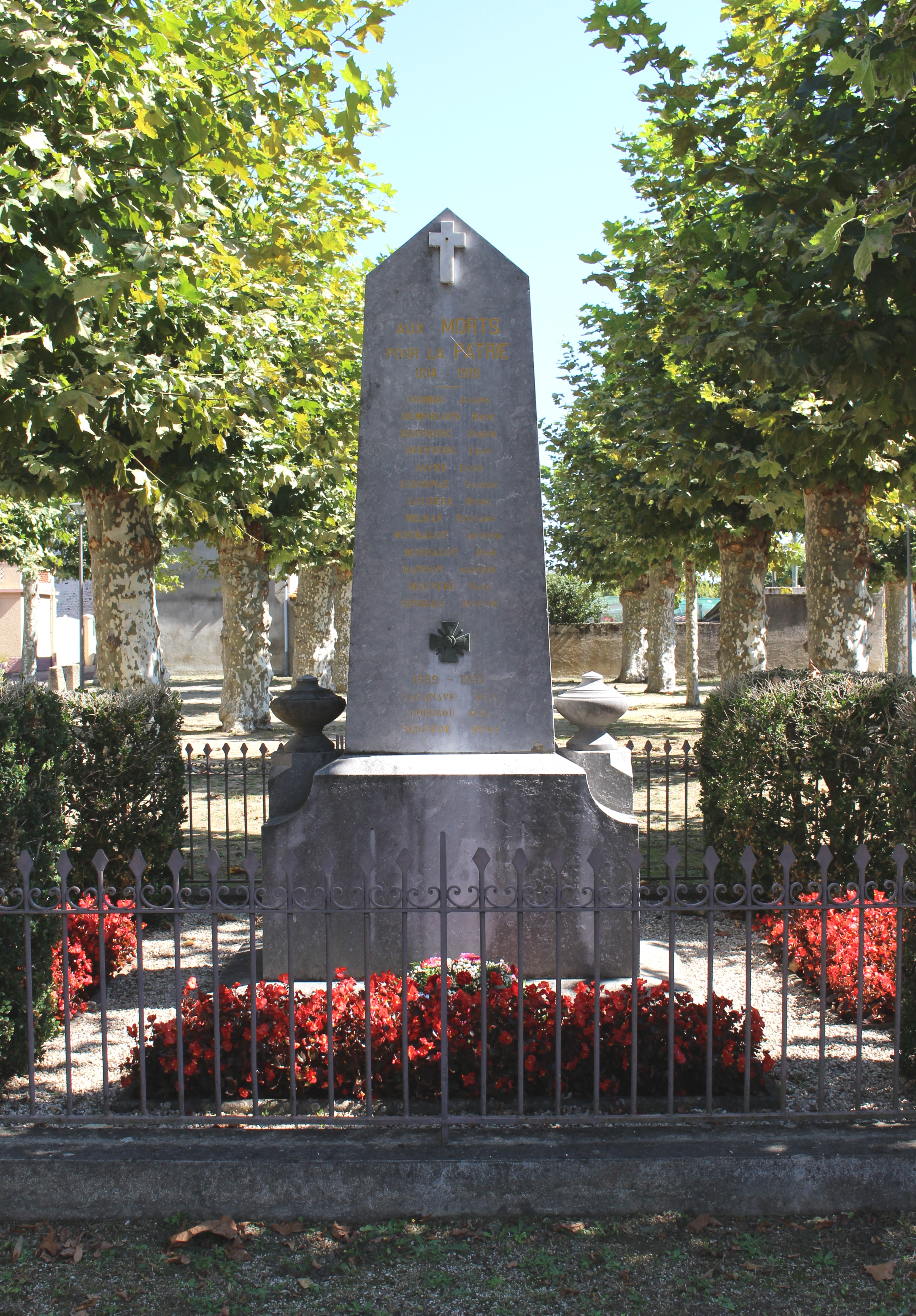 Monument aux morts de Camalès (Hautes-Pyrénées)